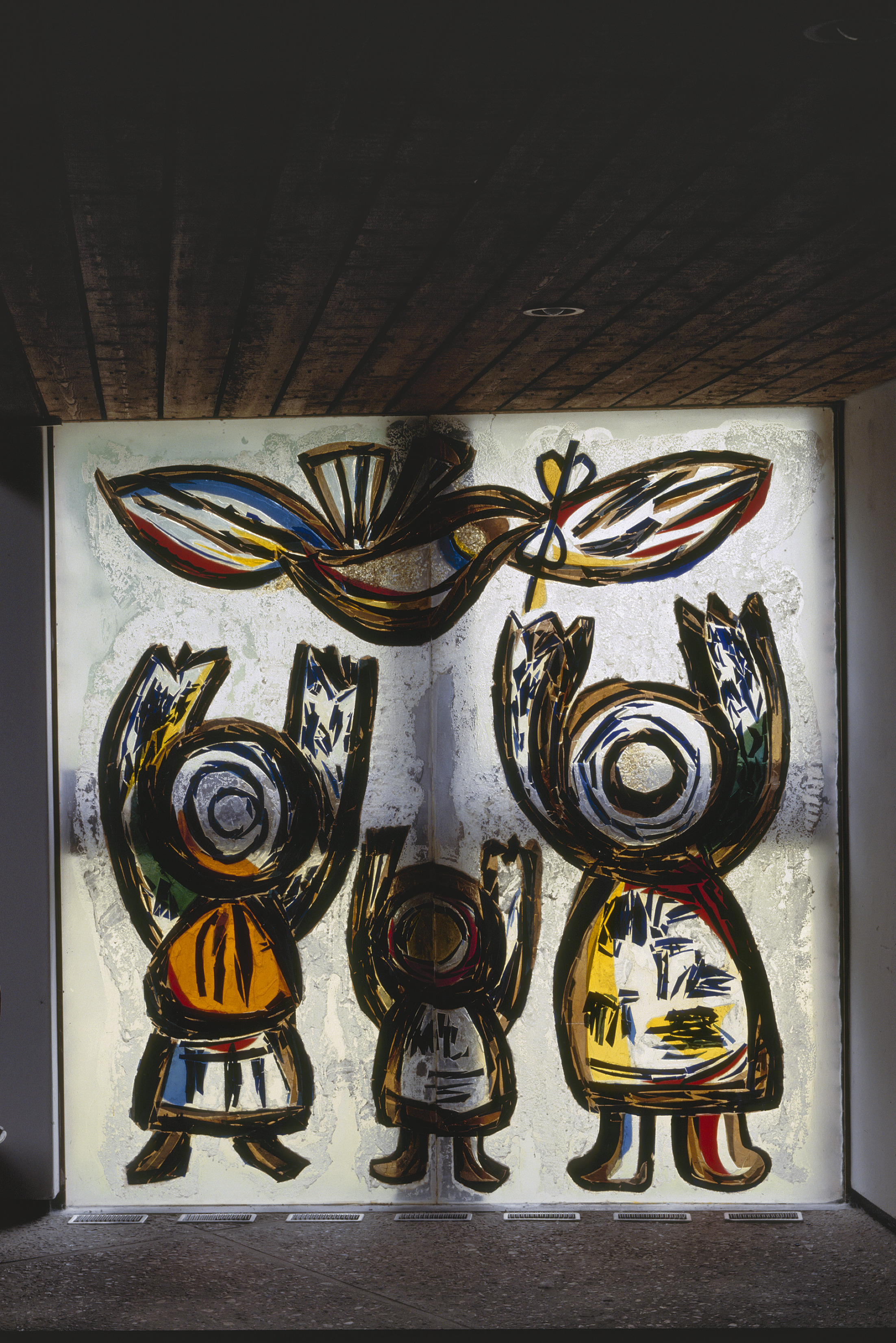 Thans Gesloopte Gereformeerde Kerk De Ark: Interieur, aanzicht glasappliqué (opmerking: Gefotografeerd voor Glas in lood in Nederland 1817-1968)